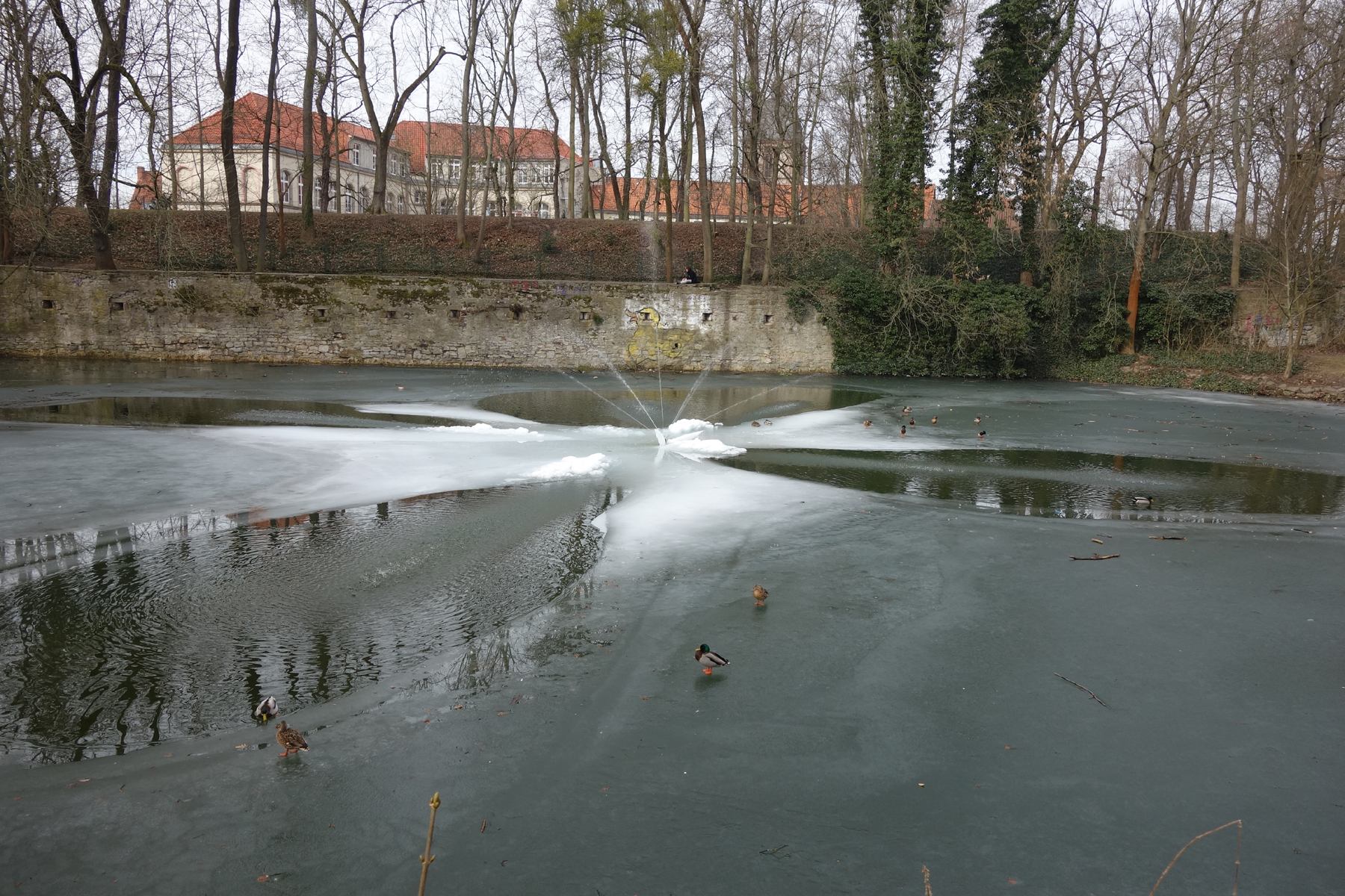 Enten auf teilweise zugefrorenem Teich im Göttinger Cheltenhampark bei etwa -10°C.